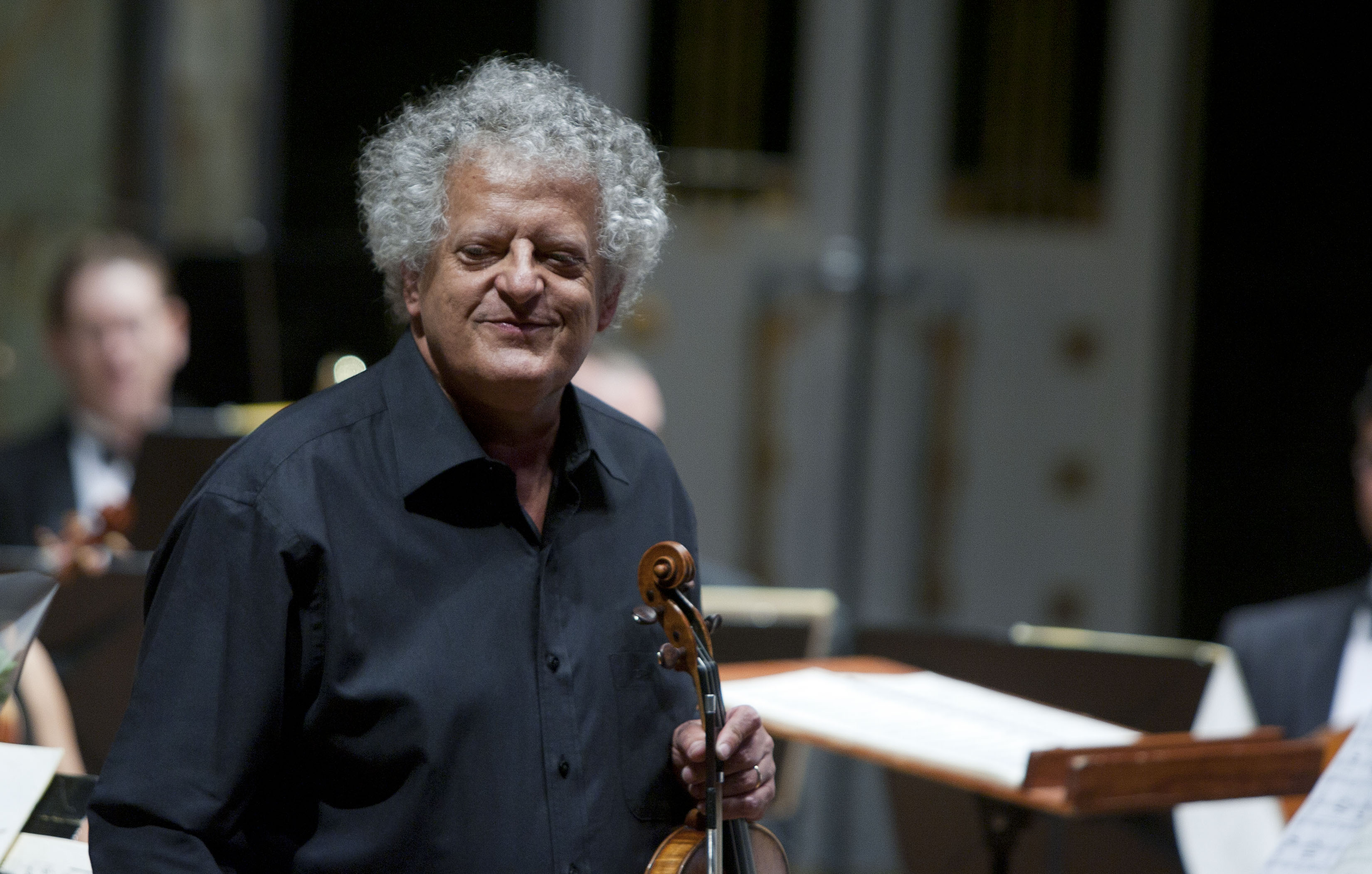 Sabado, 14 de jUNIO 2014. En el marco del 80o Aniversario del Palacio de las Bellas Artes se presento la Orquesta Filarmonica de la Ciudad de Mexico acompañados del gran violinista Irvine Arditti quienes interpretaron el programa que incluye Concierto para violín, de György Ligeti, con el violinista Irvine Arditti, y Una vida de héroe de Richard Strauss, bajo la dirección del maestro José Areán. Foto: Octavio Nava